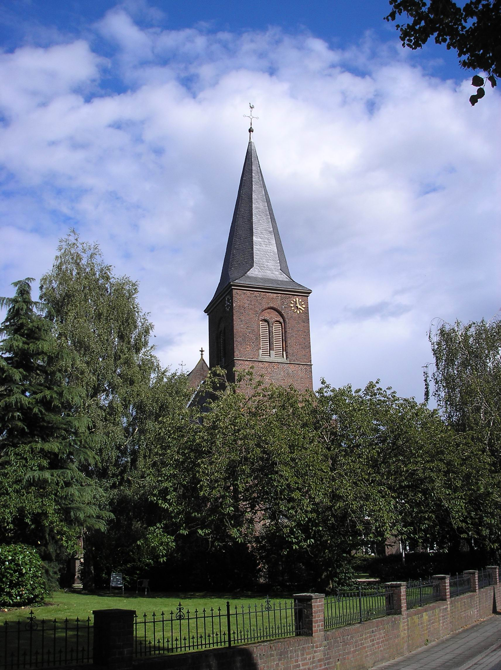 St. Peter-Kirche in Huisberden, Gemeinde Bedburg-Hau.